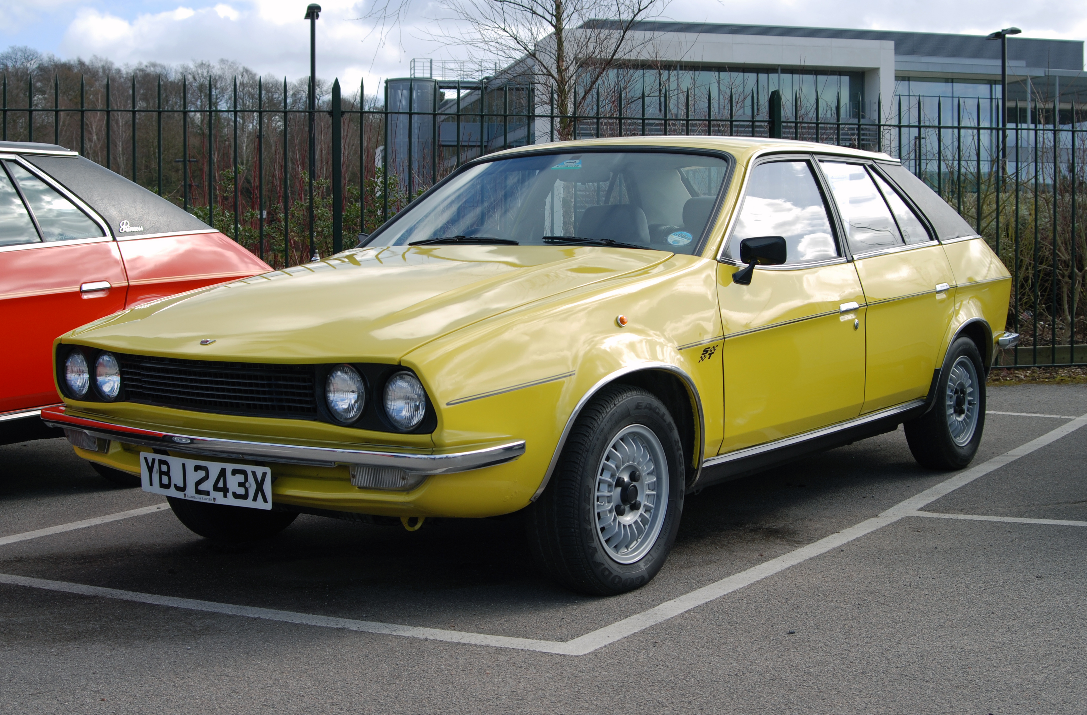 Brooklands,Mar 2009